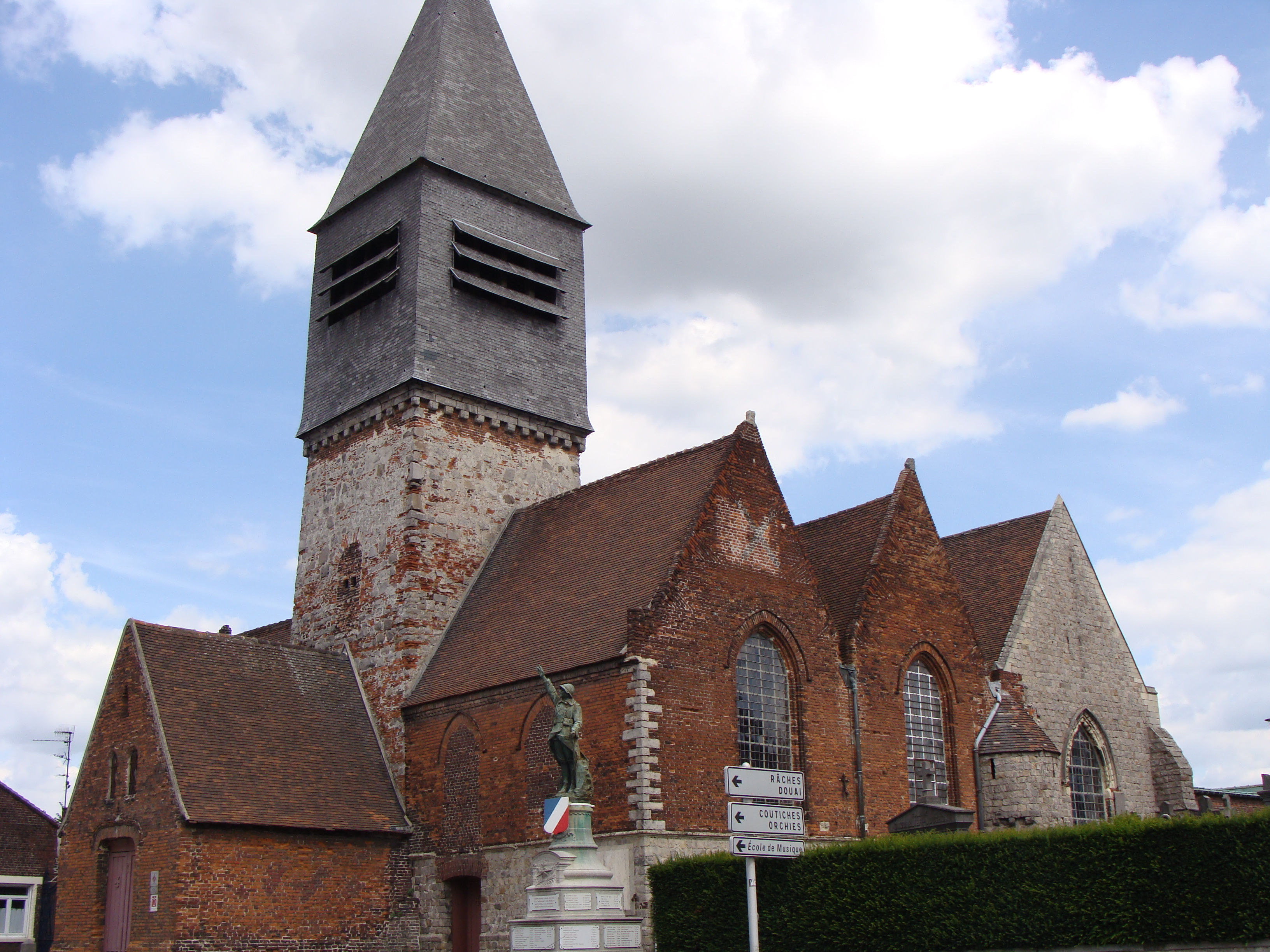 L'église de Flines-lez-Raches département du Nord (France)